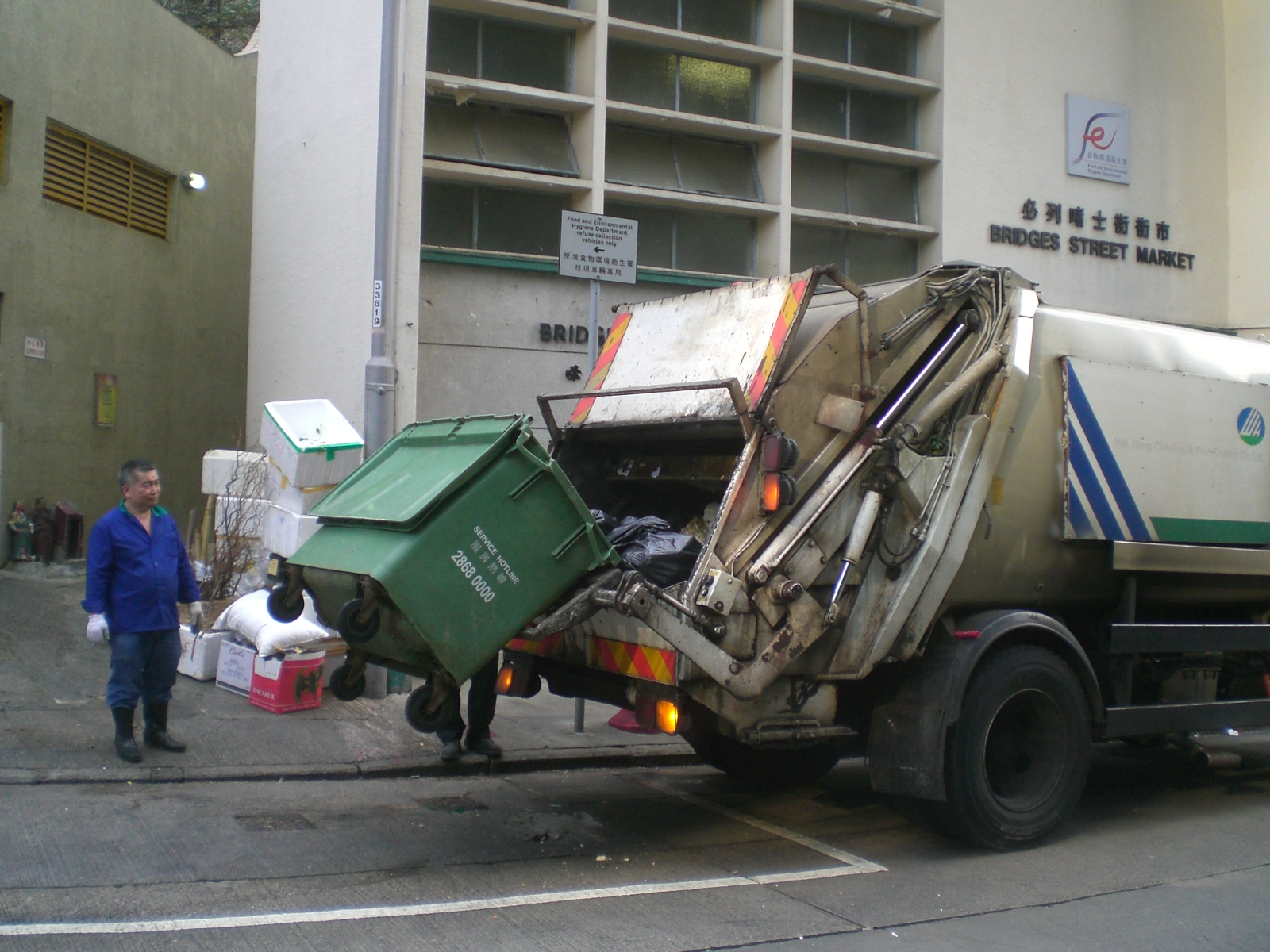 上環必列者士街垃圾站, 垃圾車 & 必列者士街街市